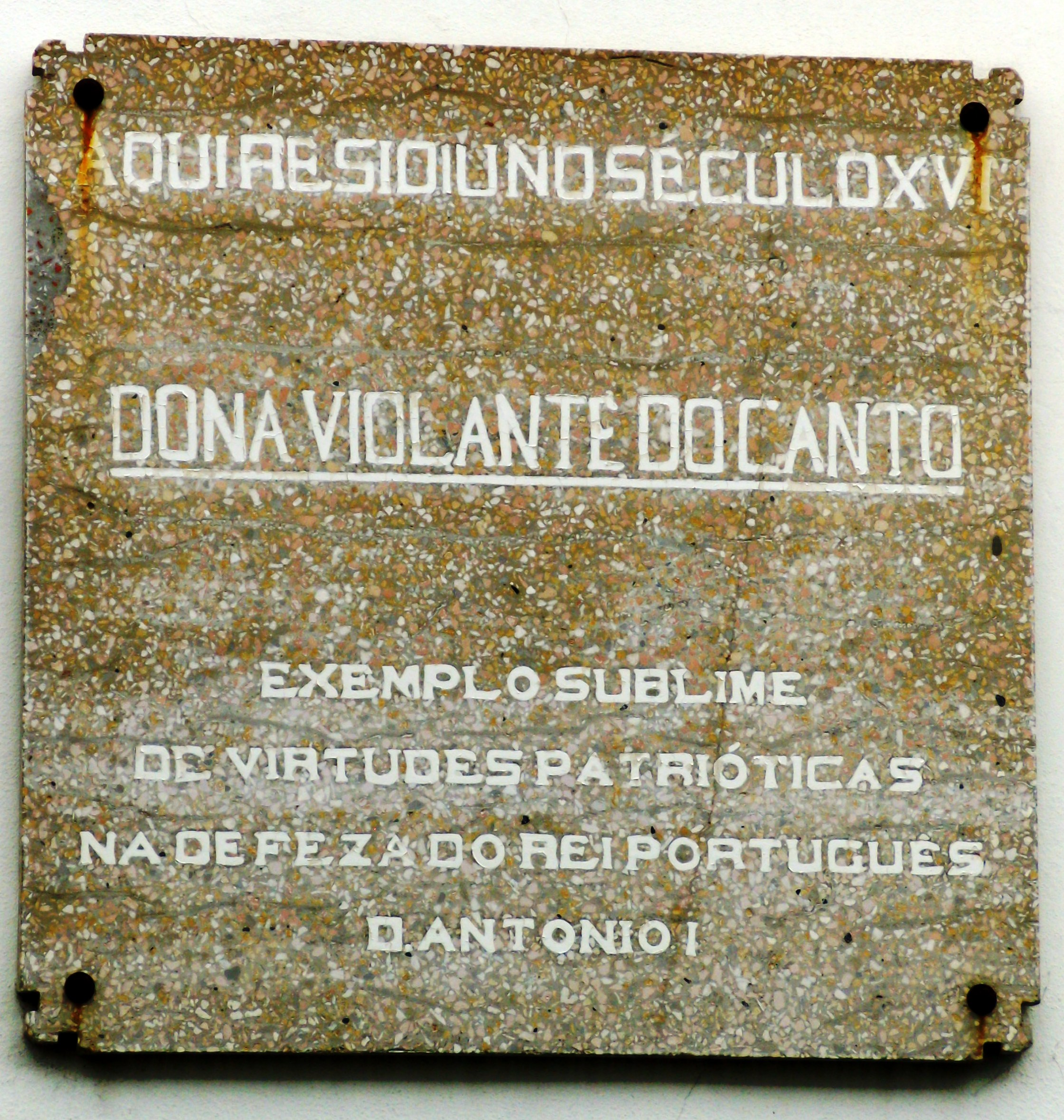 Casa de D. Violante do Canto, Angra do Heroísmo, ilha Terceira, Açores: placa alusiva.